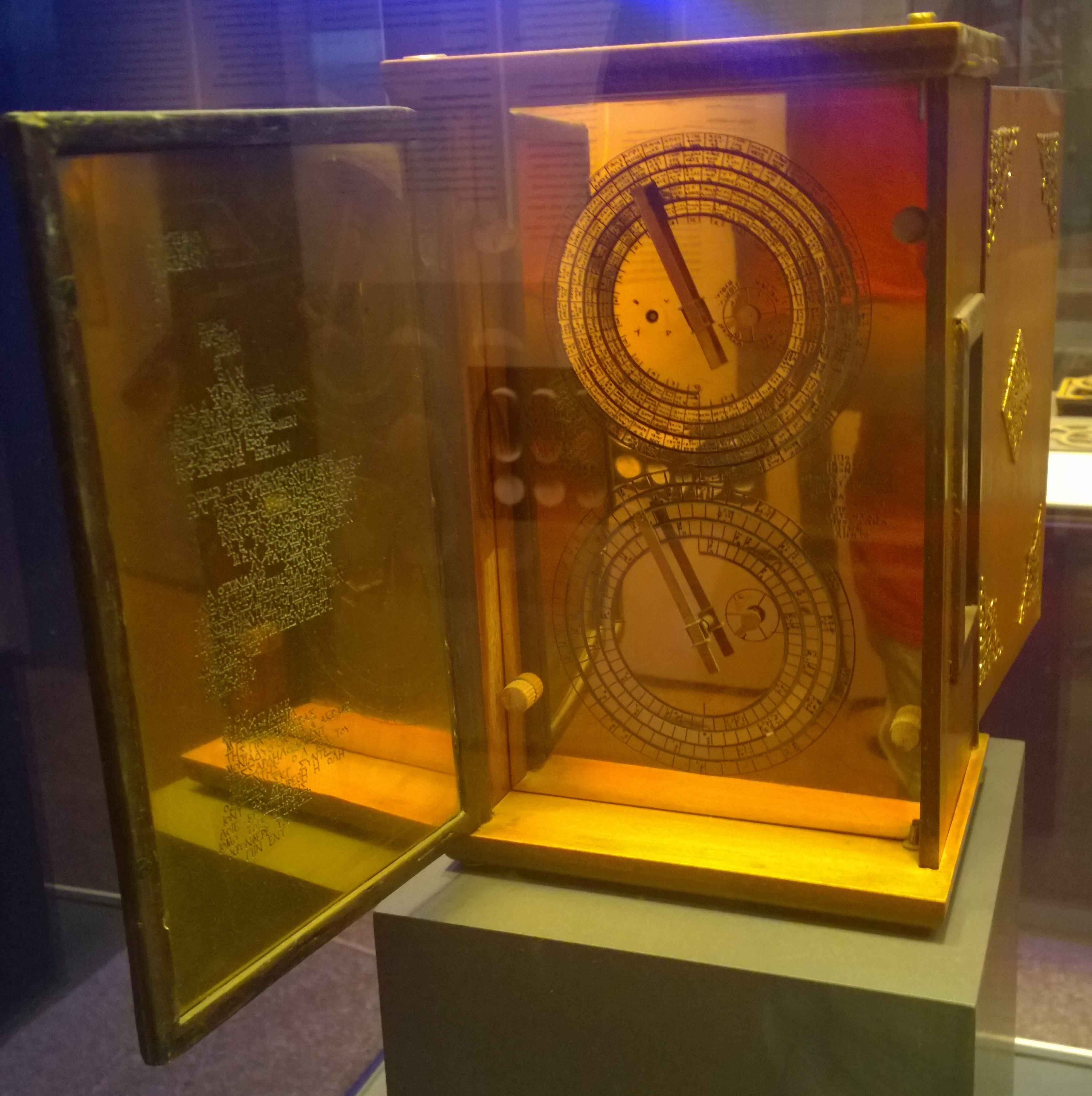 Reconstruction of antic analog computer from Antikythera shipwrek foun in 1901. The Greek inscriptions on the surface refer astronomical calculations fow calendar purpose.